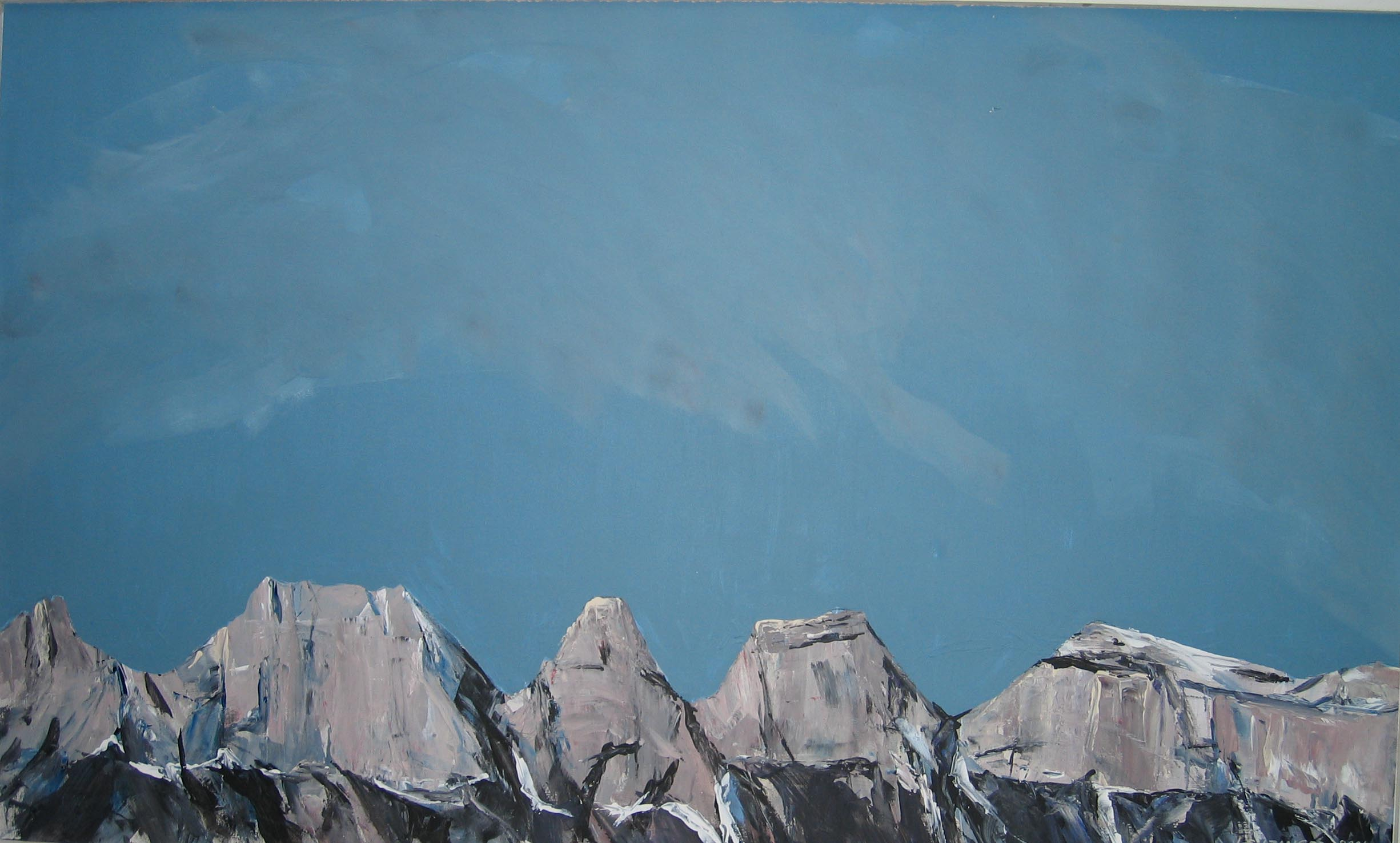 Gemälde «Churfirsten» von Heinz Leuzinger. Acryl, 89x144, 2005